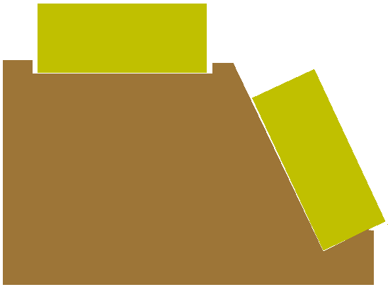 Zelf ontworpen en zelf getekend